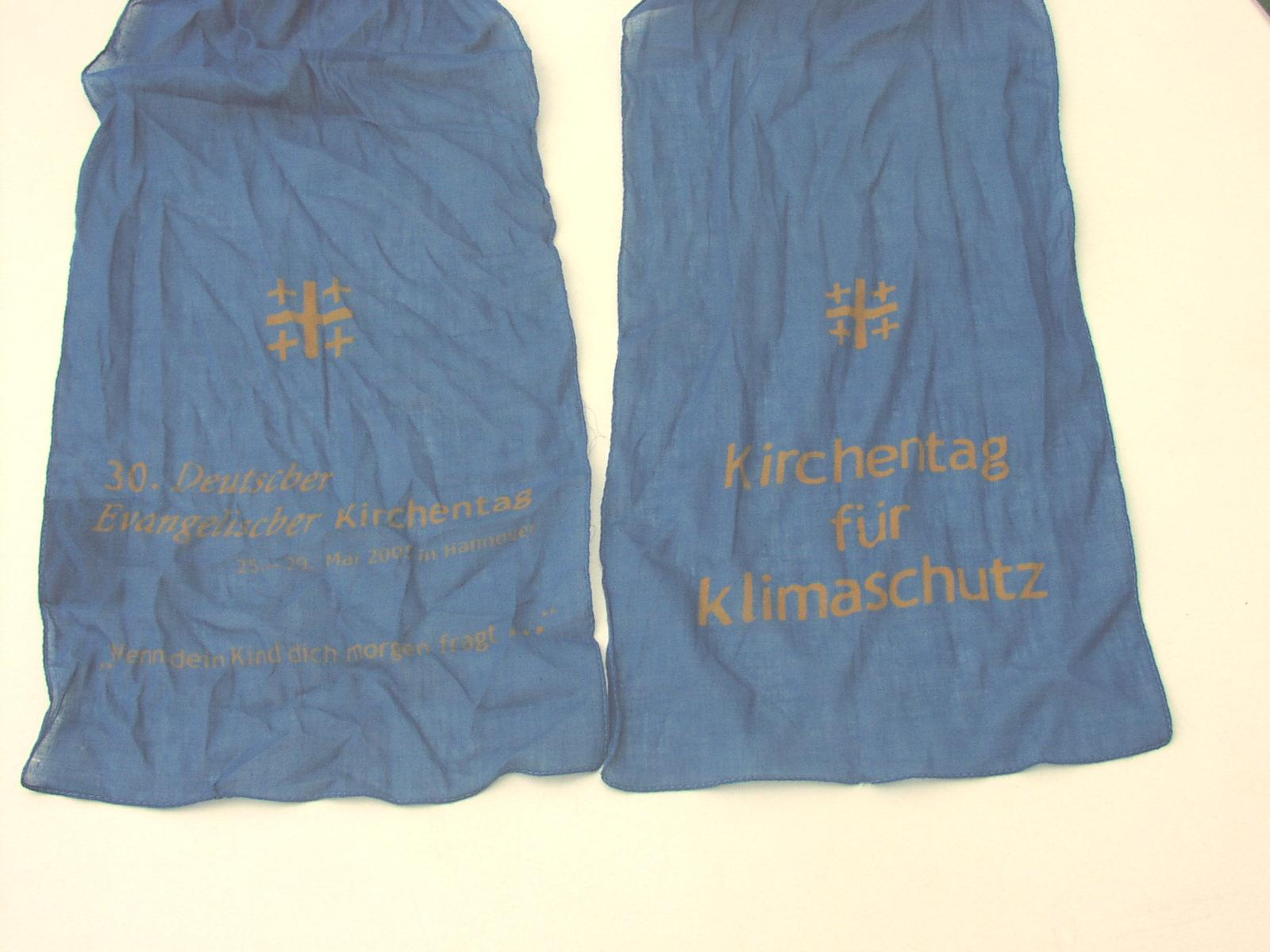 30. Deutscher Evangelischer Kirchentag Hannover 2005, Blaues Tuch